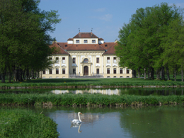 Außenansicht von Schloss Lustheim in der Schlossanlage Schleißheim